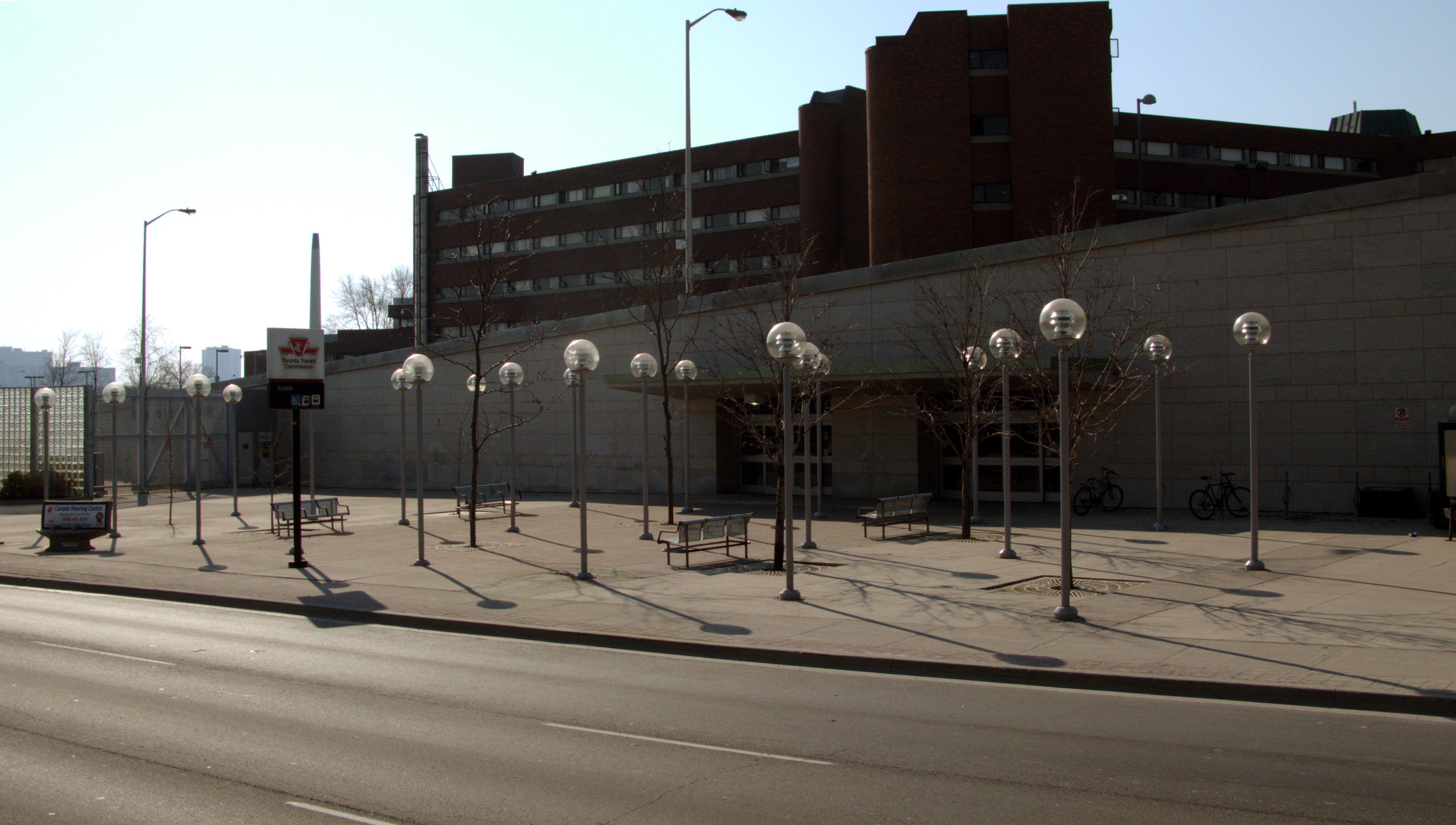 TTC Leslie station Sheppard Ave. entrance